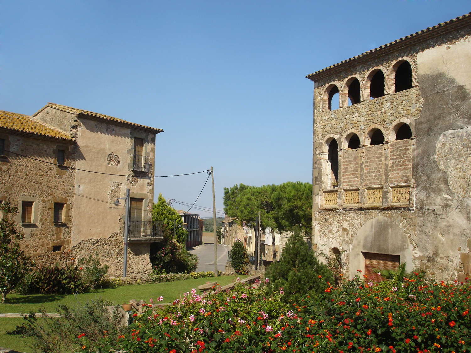 Ultramort